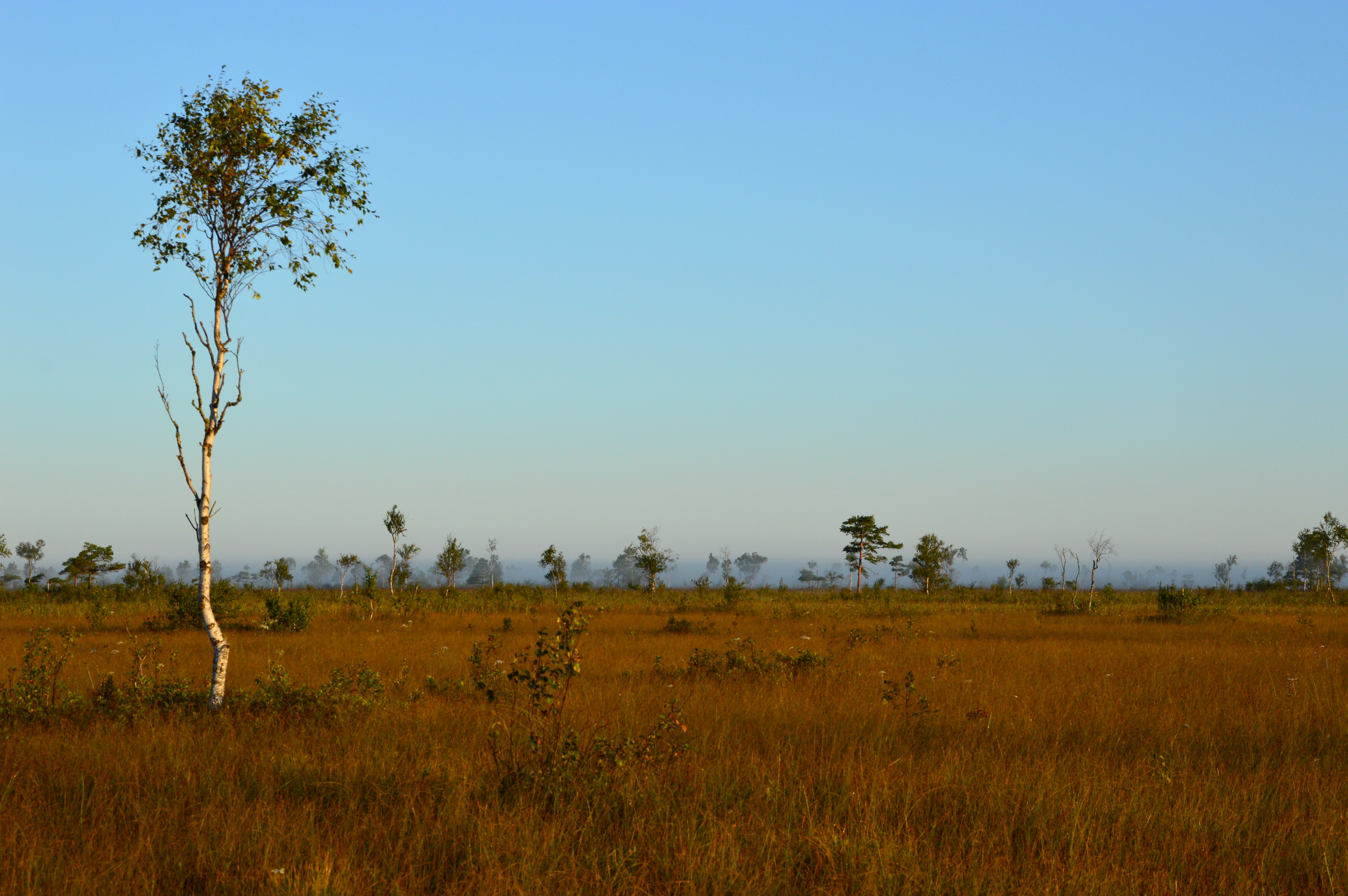 Avaste soo